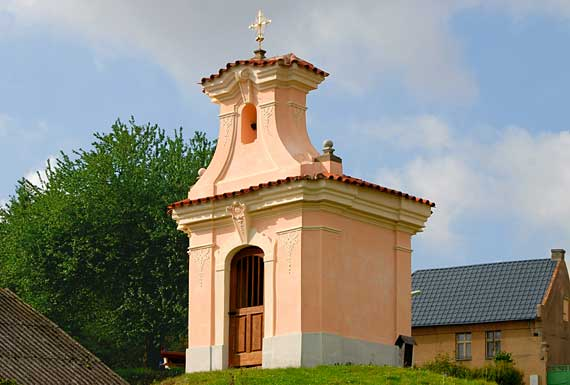 Kaple (Hořešovičky), náves, Hořešovičky